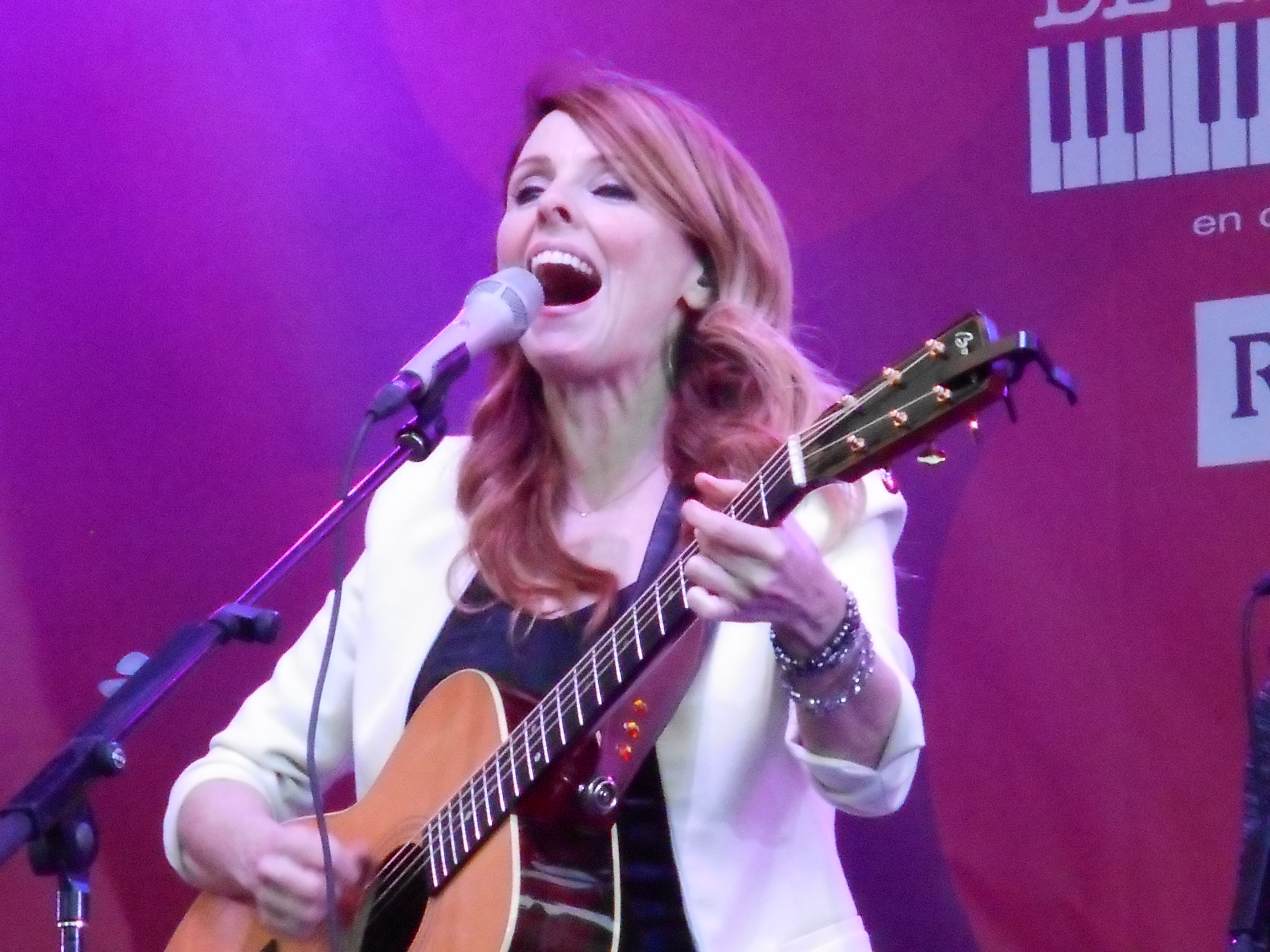 Spectacle de France D'Amour, le 2 juillet 2016, rue Sainte-Catherine, dans le cadre du Festival international de jazz de Montréal